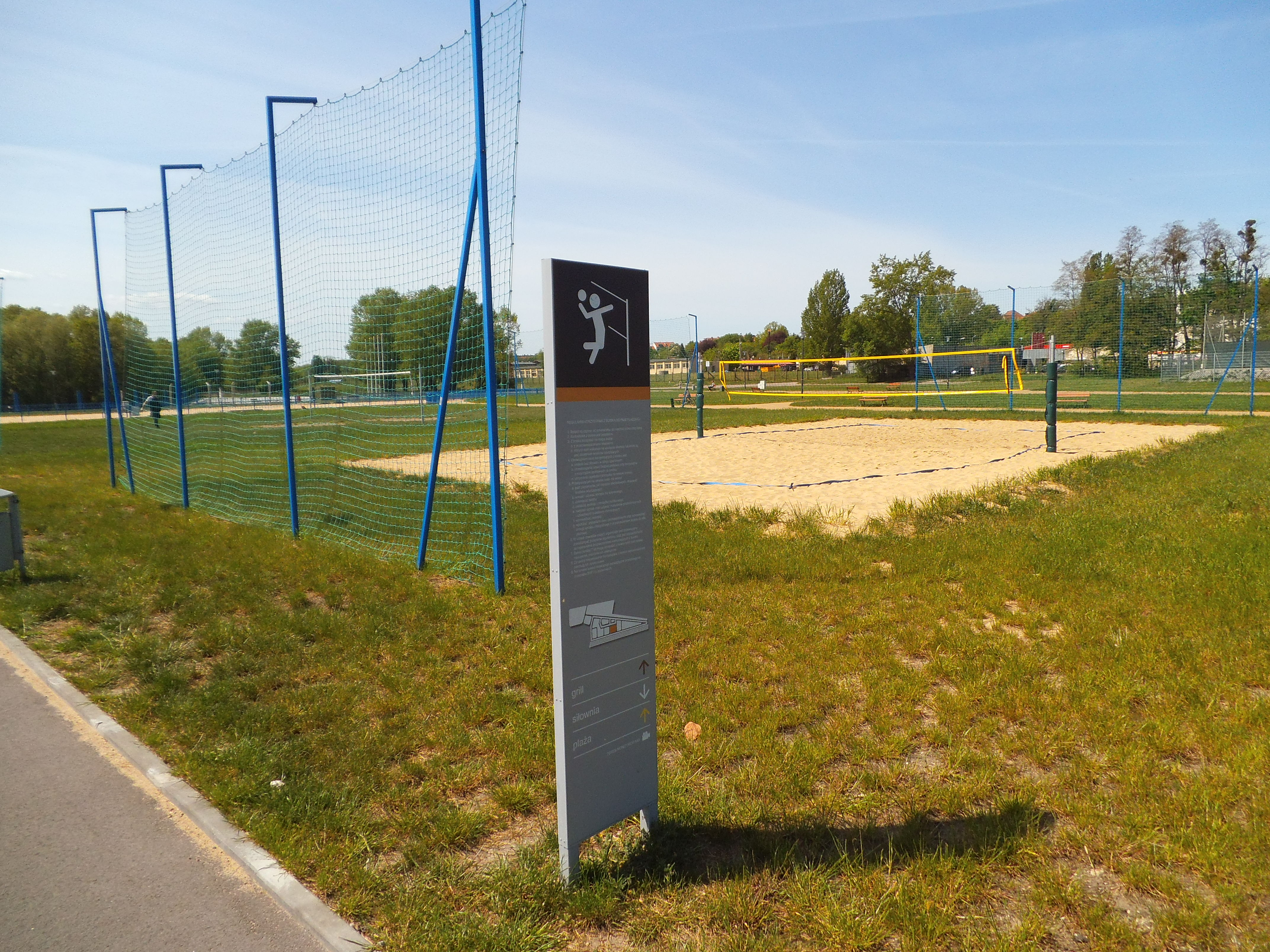 boisko do piłki plażowej w Toruniu